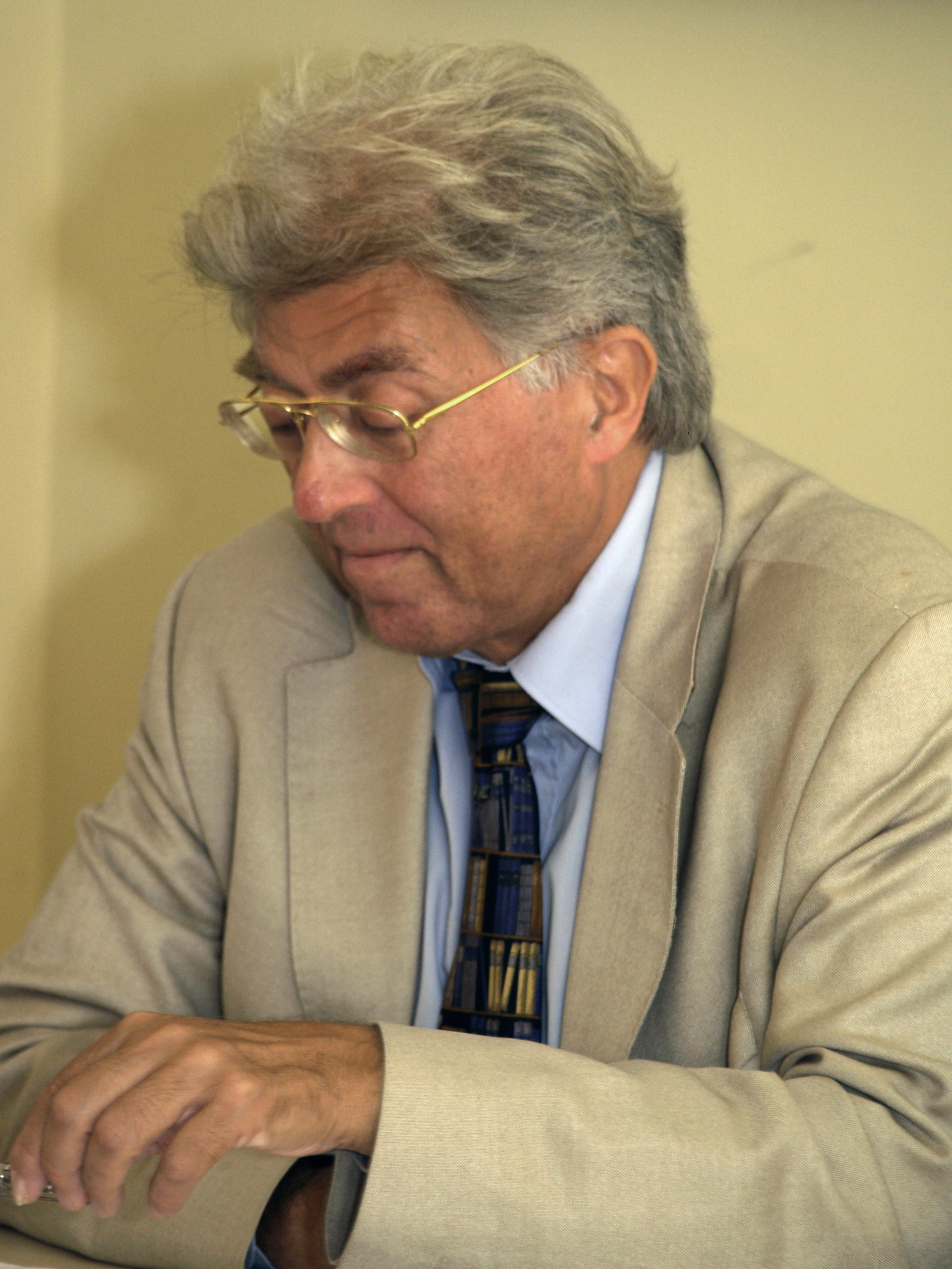 Frédéric Barbier előadást tart a Szegedi Tudományegyetemen